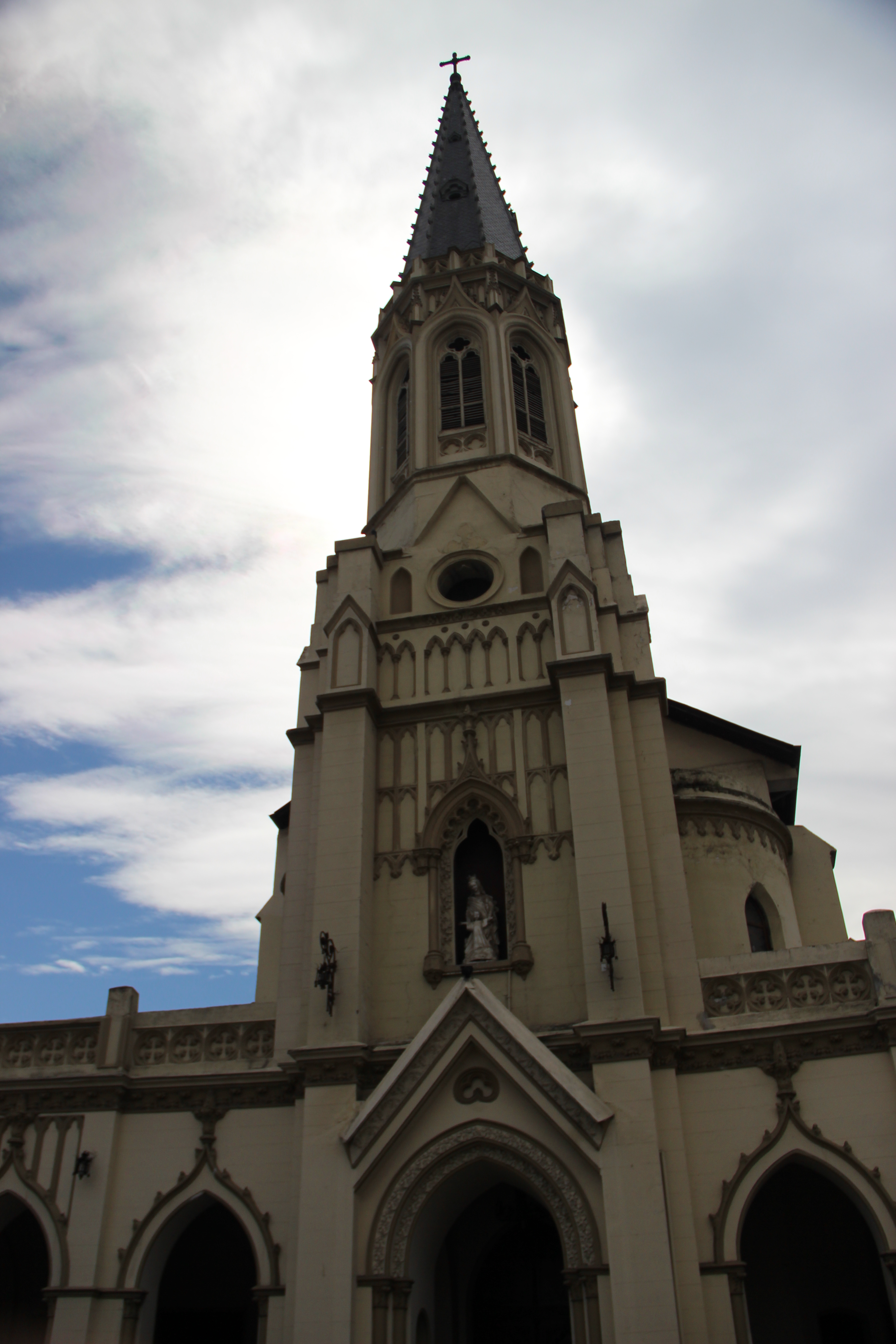 Santa Filomena N.º 315 This is a photo of a national monument in Chile: 135